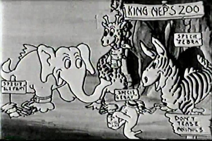 Extrait d'Alice's Day at Sea Licensing Pas de dépot de copyright d'après Walt in Wonderland p 127